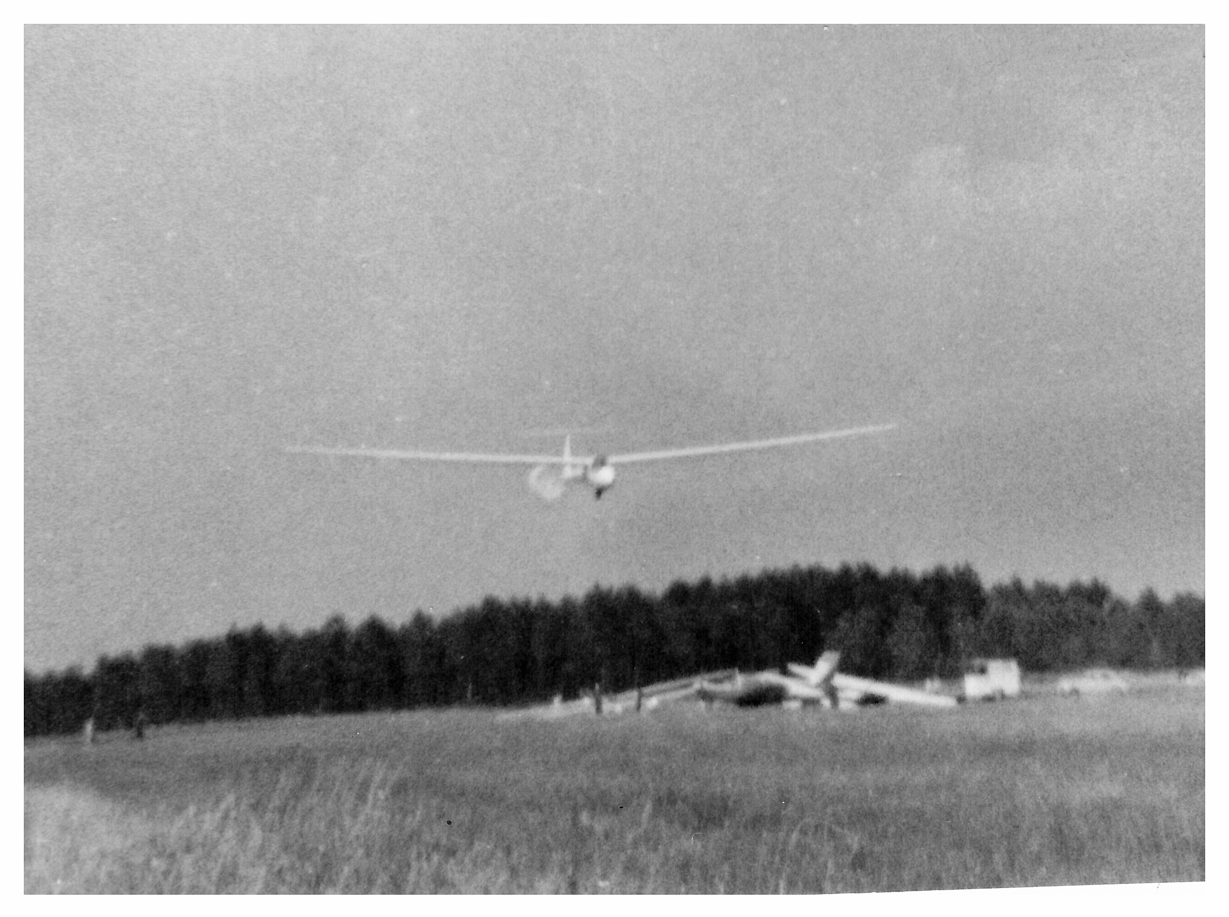 Phoebus C sur le terrain de Bordeaux Saucats vers 1970 avec un Instamatic 100